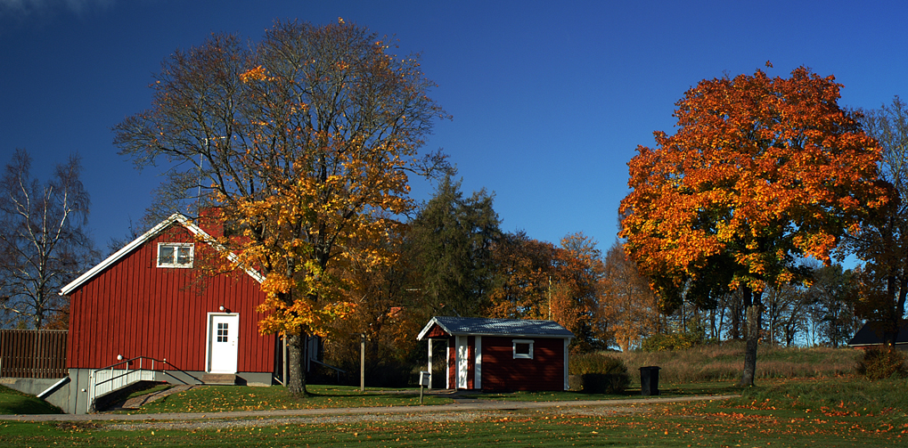 Sweden